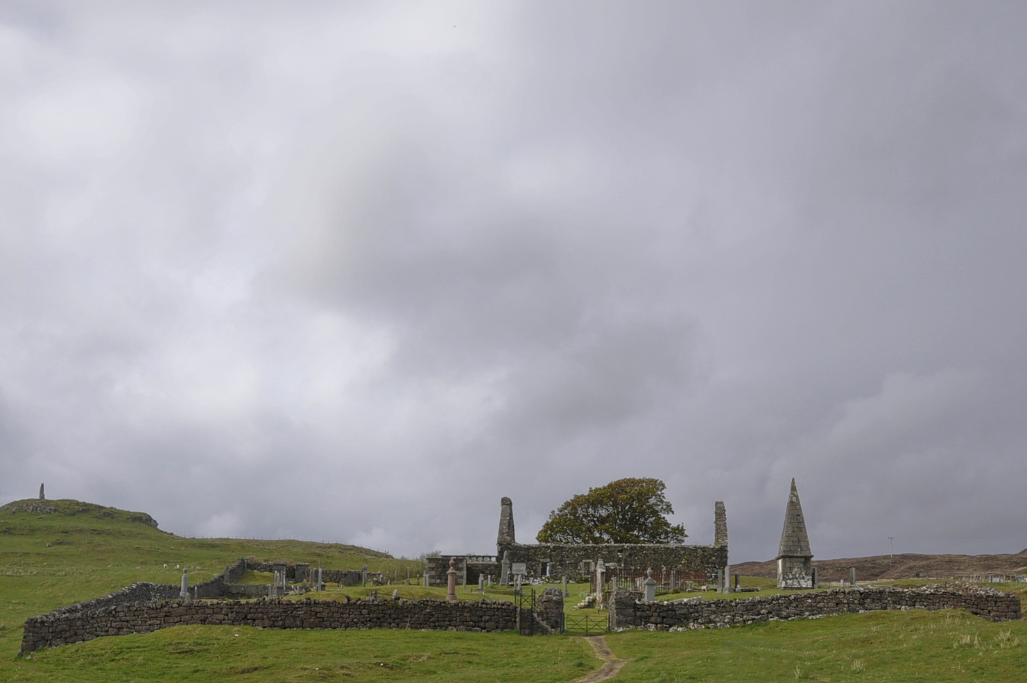 de kerk in Dunvegan, Schotland, gekend als Trumpan Church